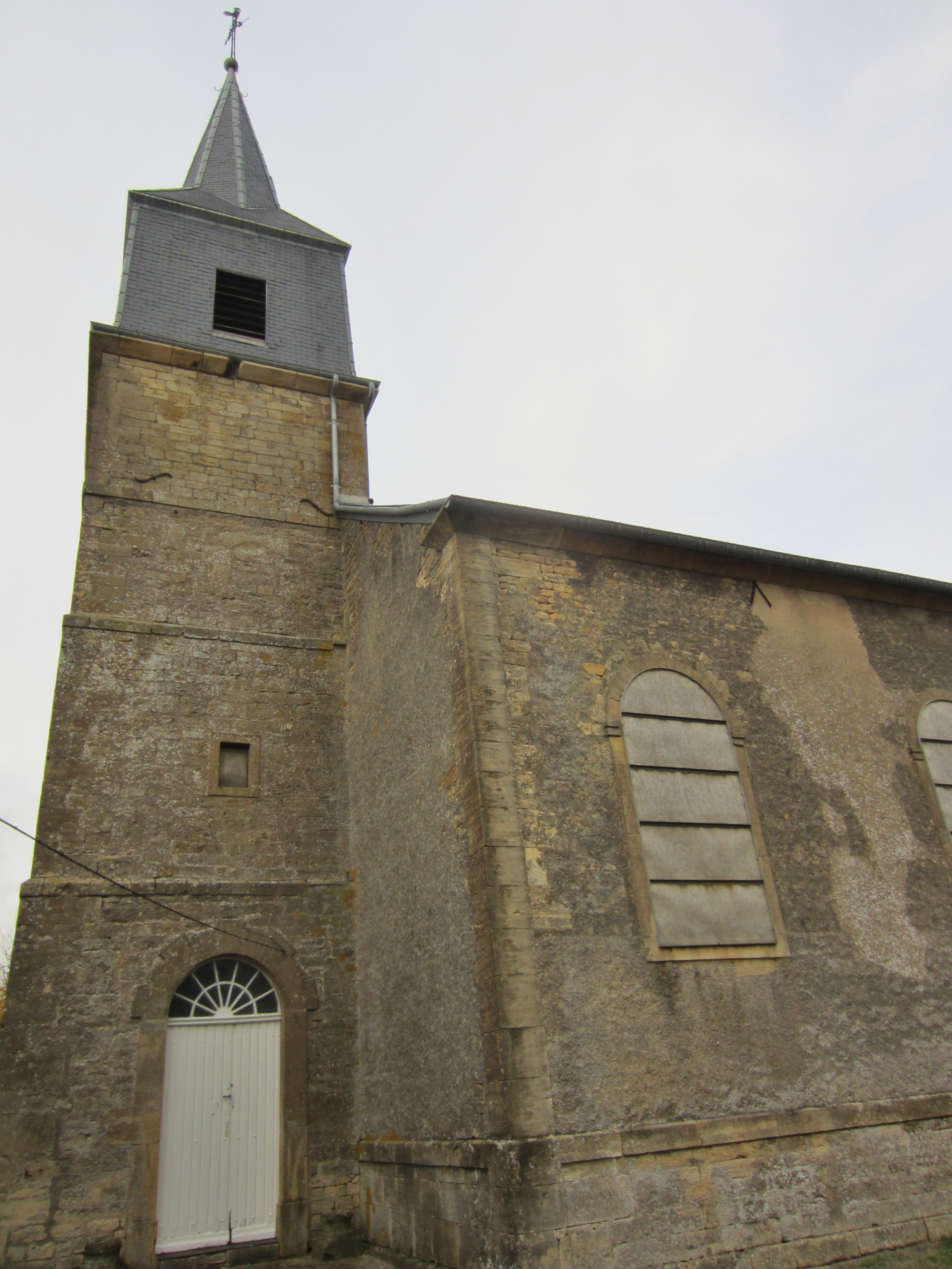 Description eglise Joppecourt eglise Joppecourt